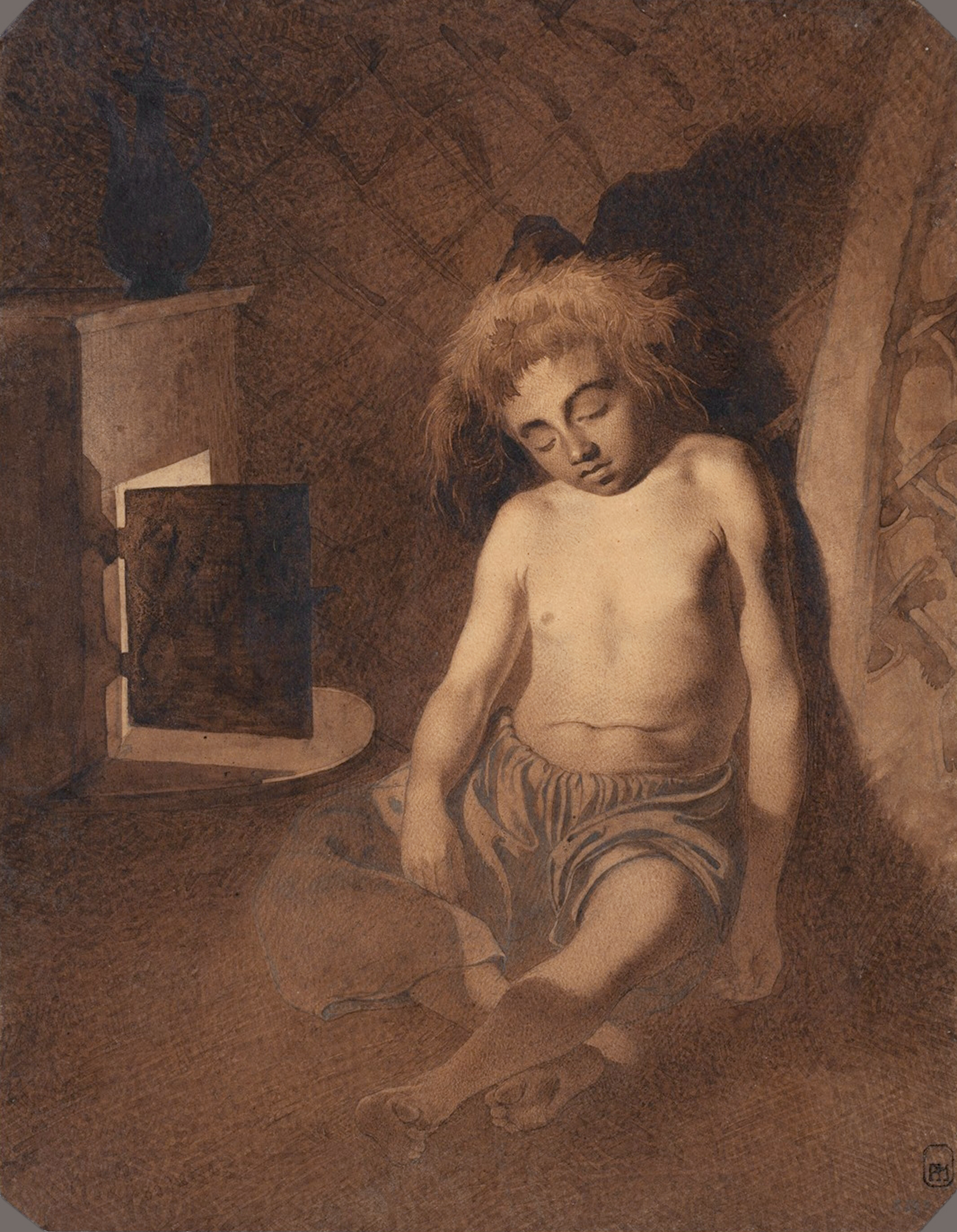 Тарас Шевченко. Хлопчик дрімає біля грубки. 1848 Малюнок виконаний під час зимівлі учасників Аральської експедиції на острові Косарал (26 вересня 1848 р. до 6 травня 1849 р.) Малюнок був у збірках Л.Жемчужникова, І.Терещенка. З 1918 р. до початку 1930-х рр. - у Російському музеї, звідки надійшов в Україну. Сепія. 23,3 × 18,1 Місце створення: Казахстан, Кизилординська область, Аральський район, острів Косарал.